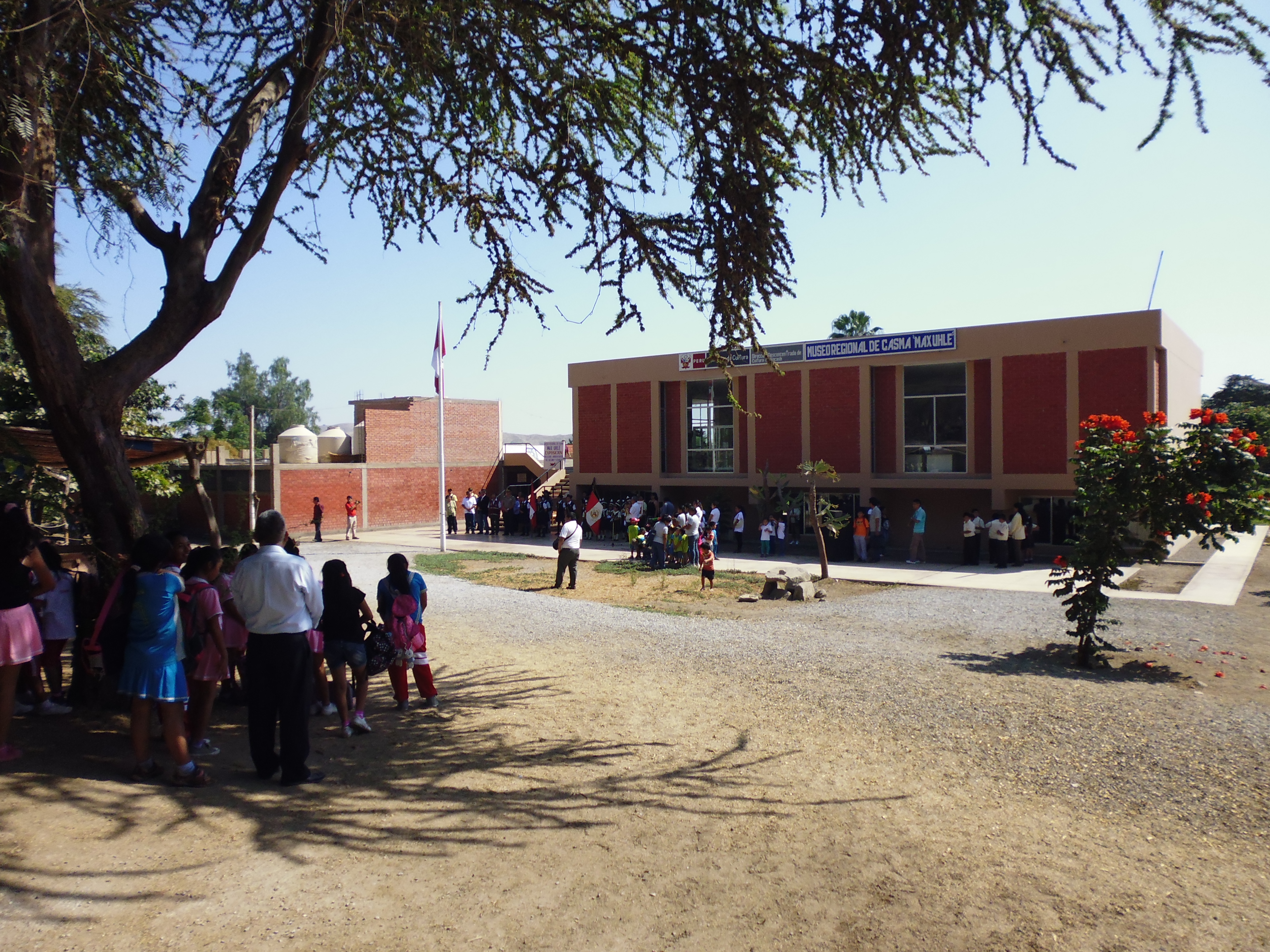 Vista del Museo Max Uhle, el 1 de Julio día del Descubrimiento de Sechín por el Arqueólogo Julio C. Tello.